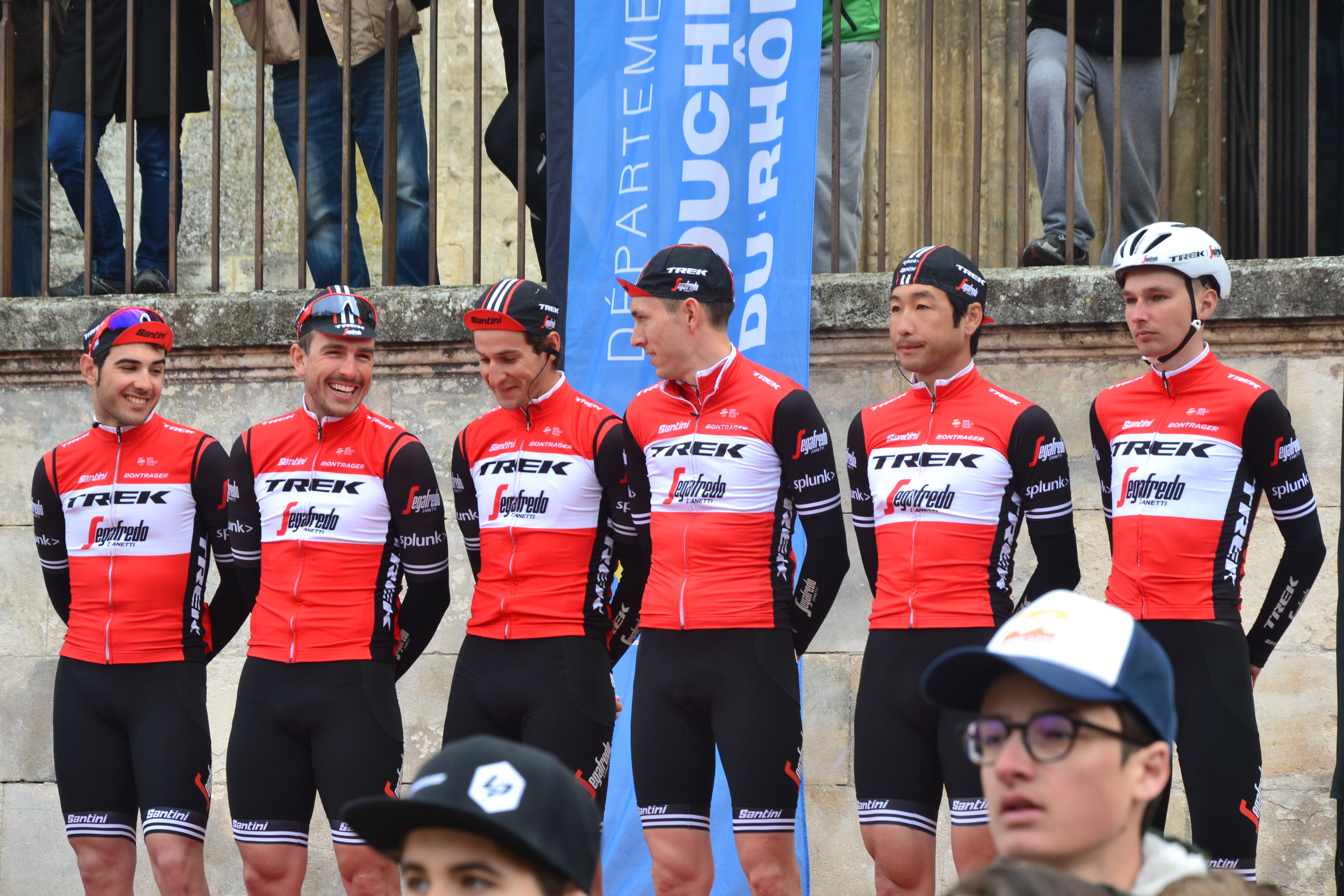 Lors du podium des signatures avant départ de l'étape